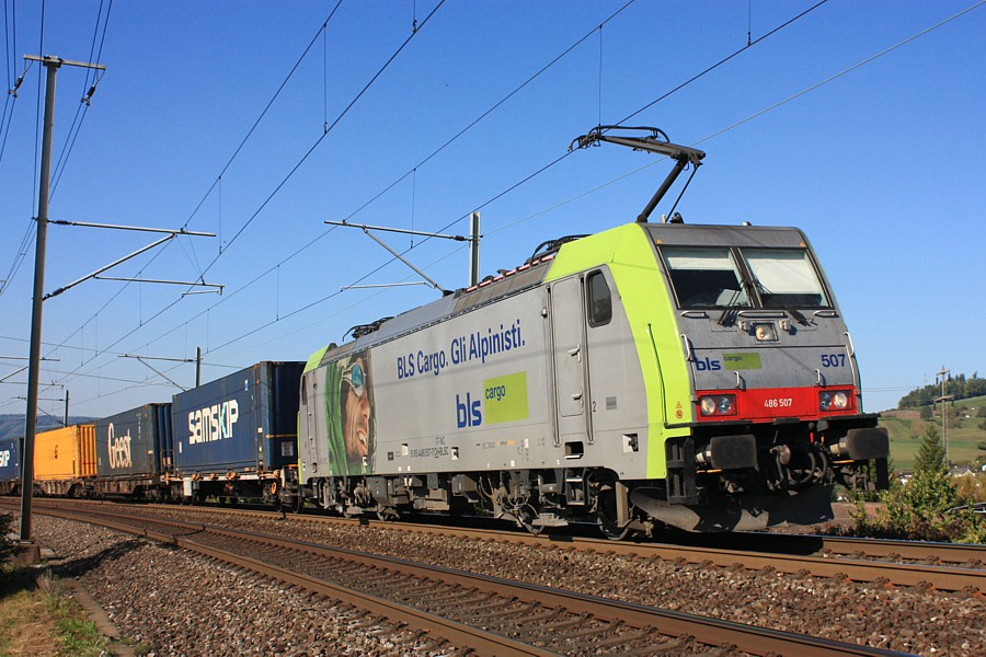 BLS Re 486 507-7 à Frick (Argovie)